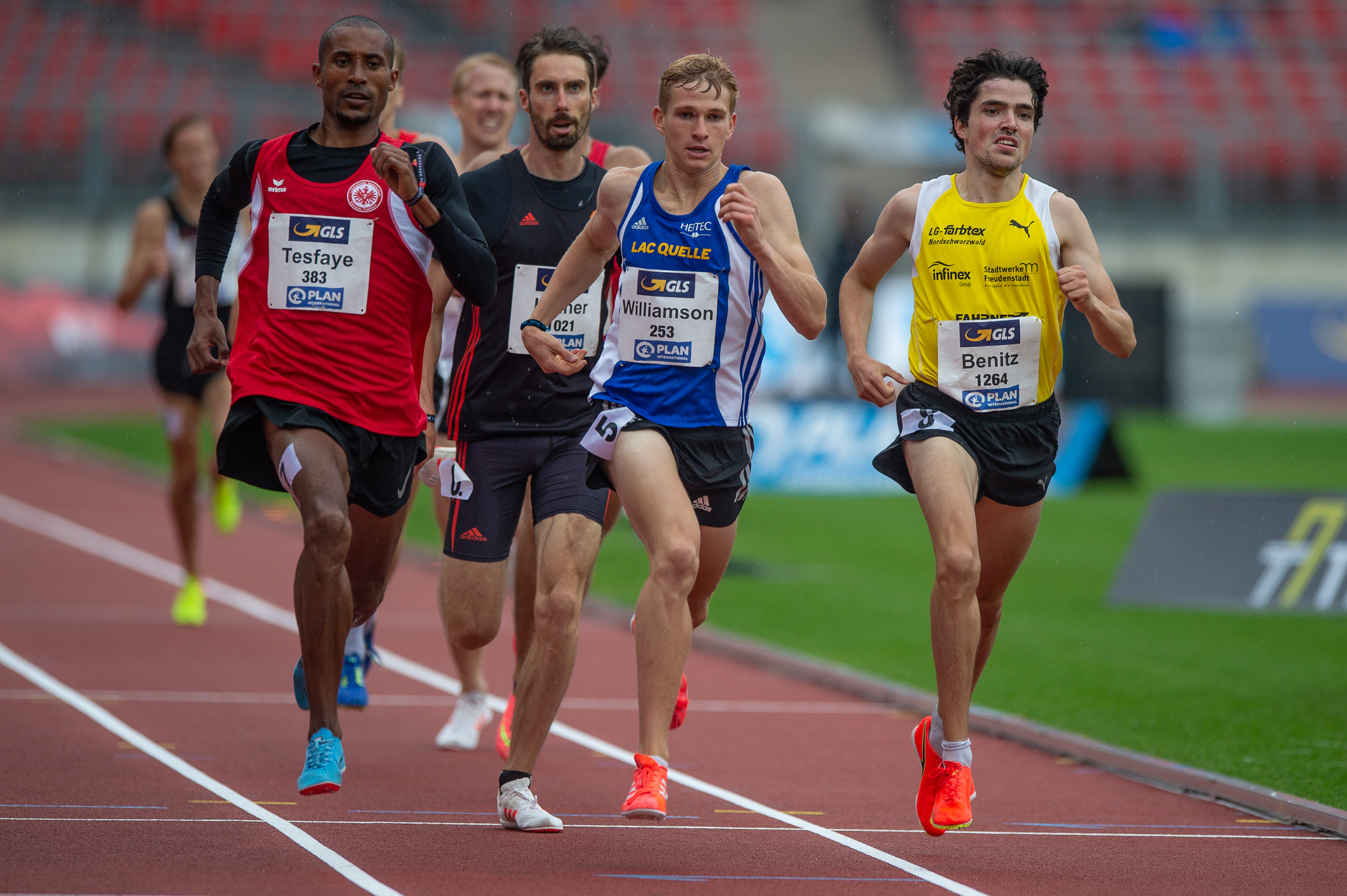 1500-Meter-Lauf,DLV,Deutsche Leichtathletik Meisterschaften 2018,Deutscher Leichtathletik-Verband,Homiyu Tesfaye,Jamie Williamson,LAC Erfurt,LAC Quelle,LG Eintracht Frankfurt,LG farbtex Nordschwarzwald,Leichtathletikcentrum Quelle Fürth,Max-Morlock-Stadion,Sebastian Keiner,Timo Benitz